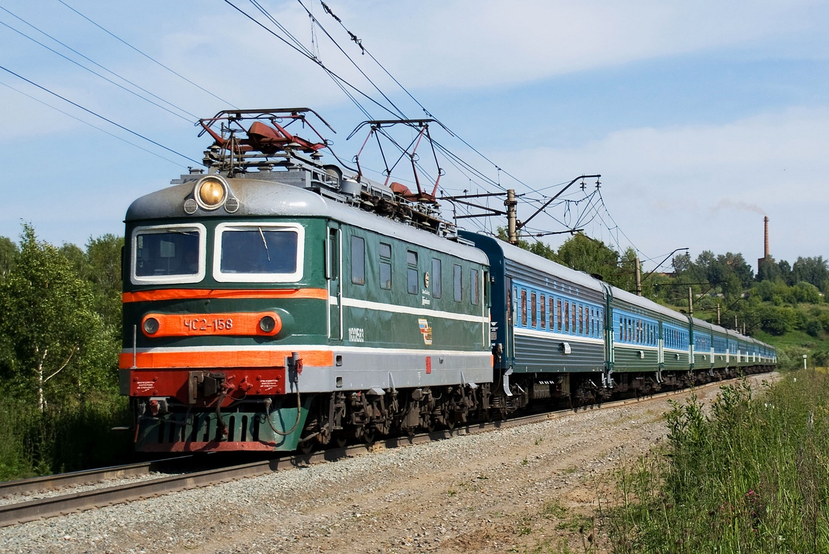 ЧС2-158 с фирменным поездом "Томич"